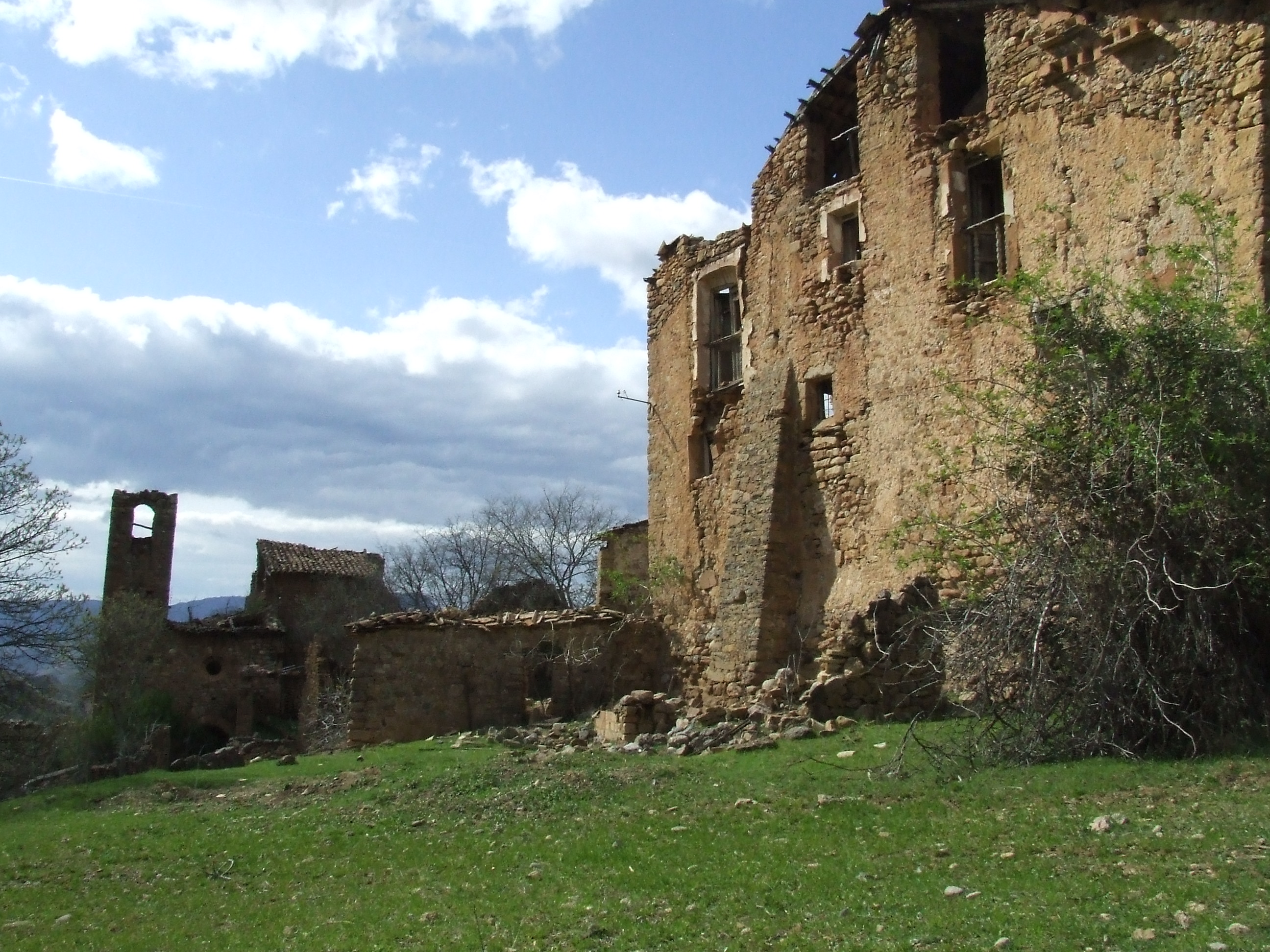 El poble en ruïnes d'Esplugafreda (Sapeira, Tremp, Pallars Jussà)